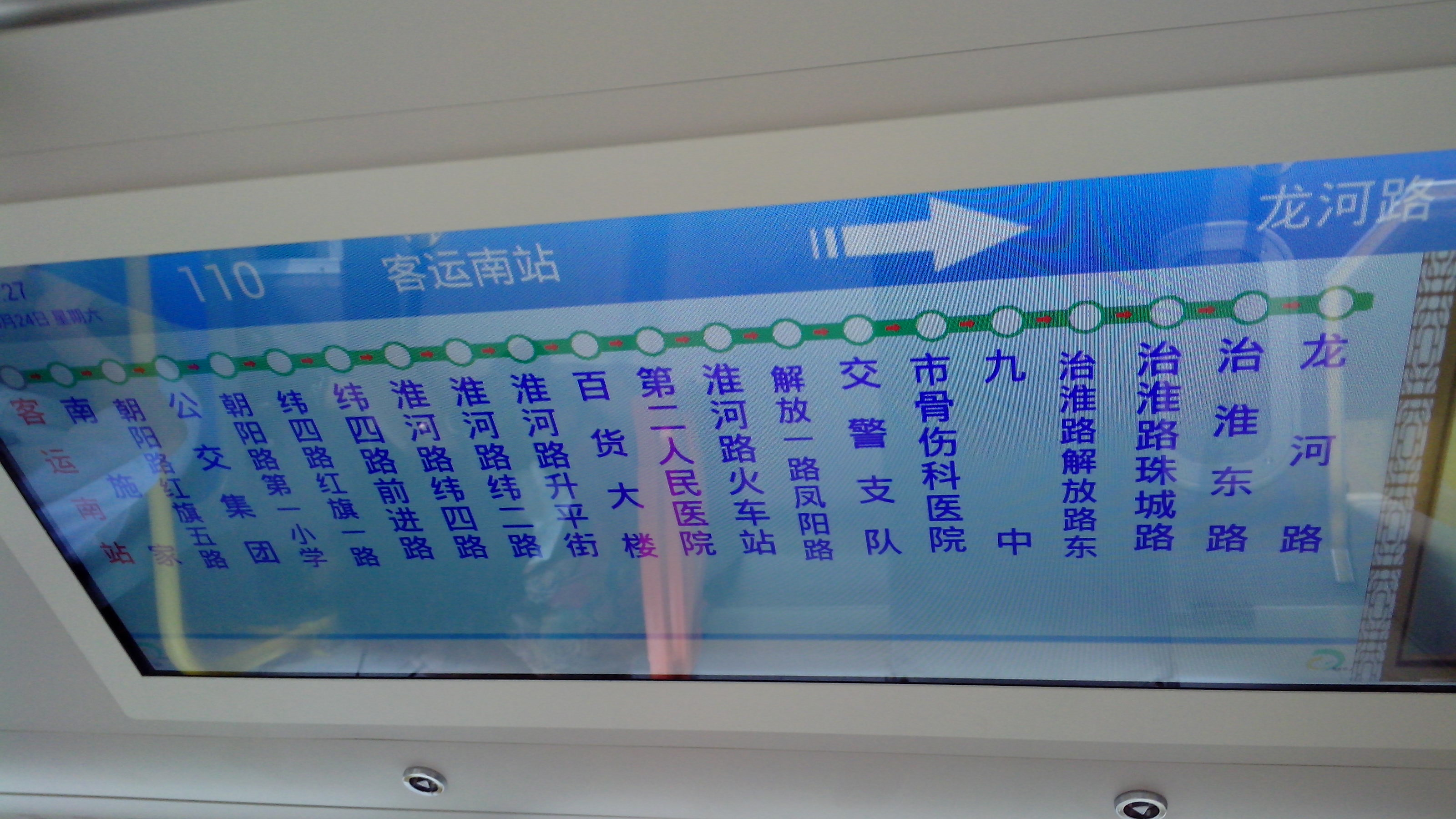 中文（中国大陆）: Bengbu Bus No.110 Interior